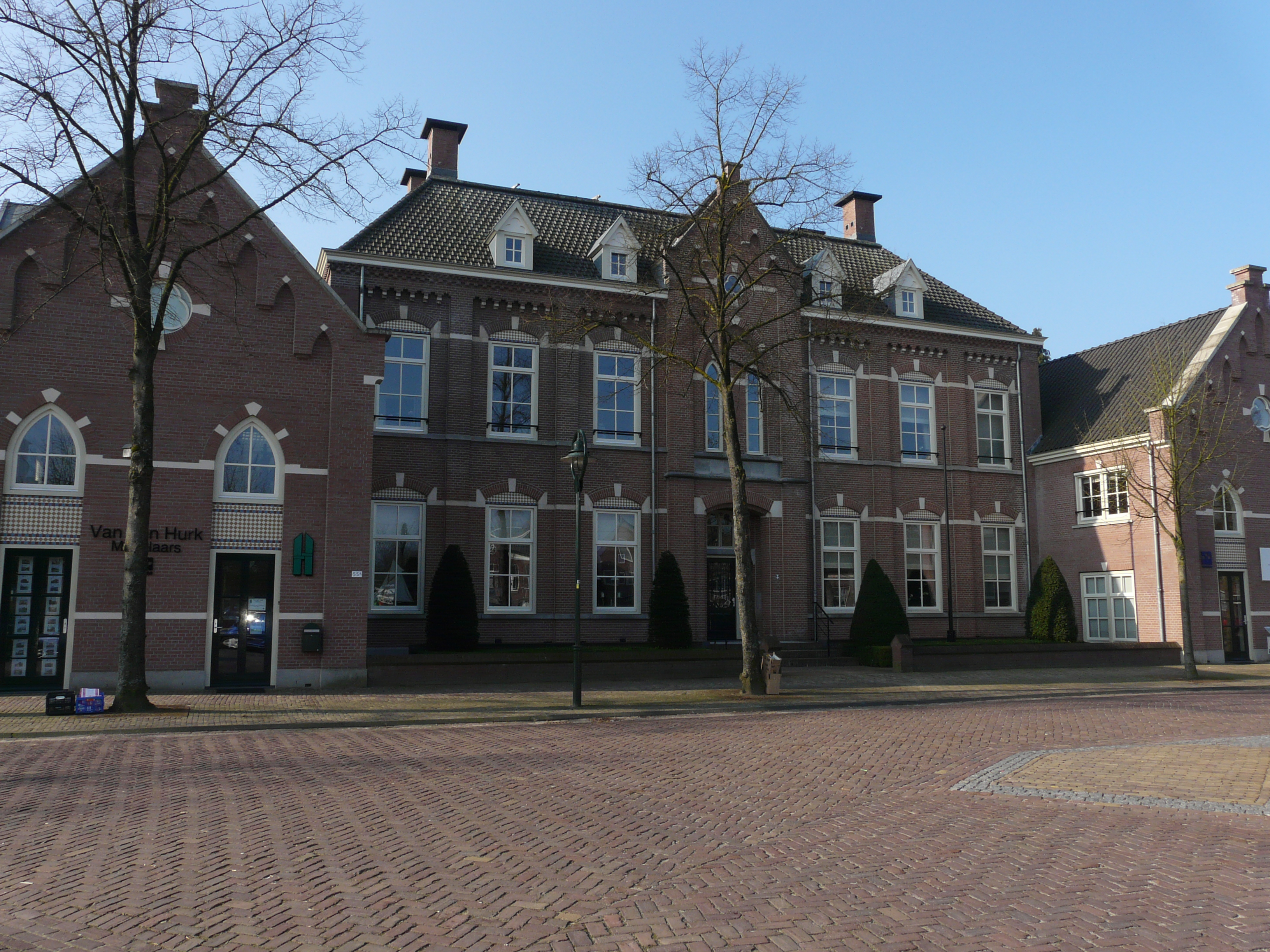 Voormalig klooster in Beek en Donk